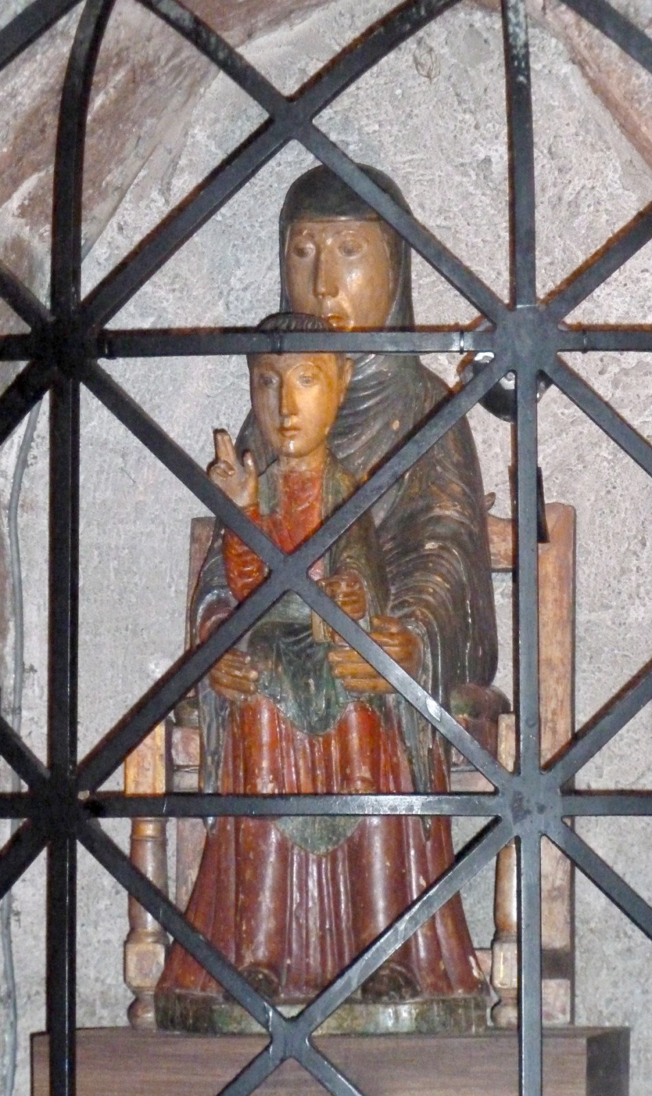 Vierge en majesté de type roman, bois polychrome, Massiac, Cantal, France